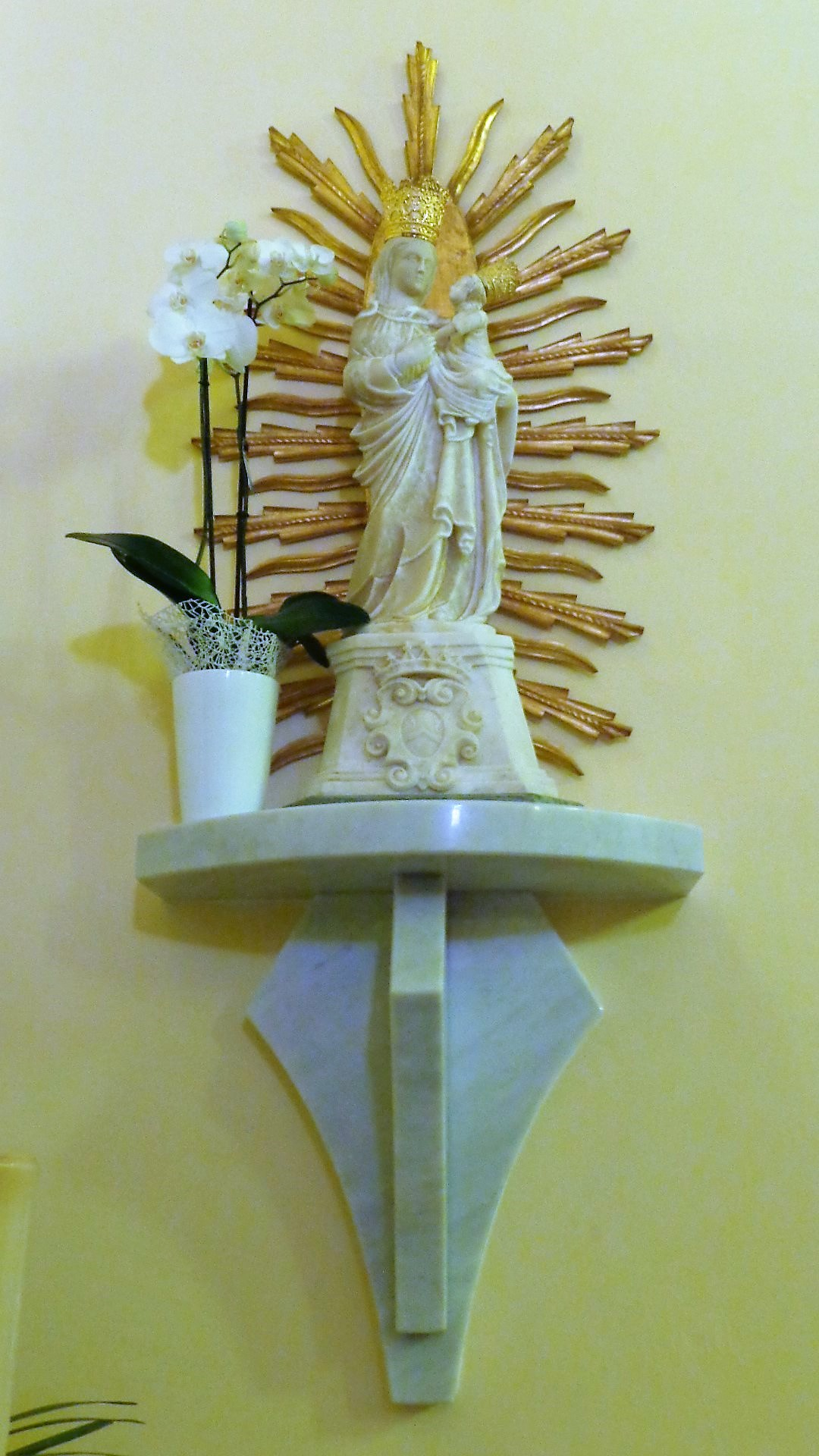 Scultura Maria Santissima di Trapani